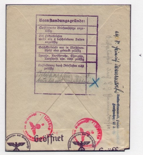 Germana koverto sendita en 1939 kaj rifuzita de la poŝta cenzuro. Inter la kialoj listigitaj estas rifuzo "lingvo, planlingvoj, Esperanto, stenografio k.s. estas malpermesataj"